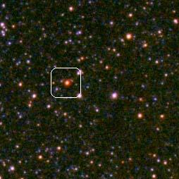 Astrofotografía tomada por, camara canon, de telescopio, Konustar 400